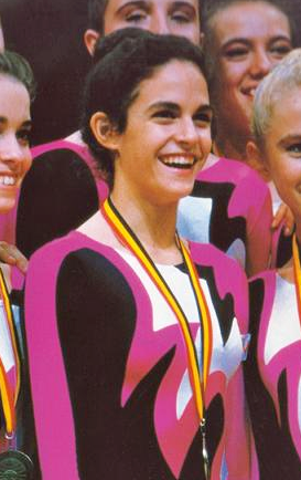 Gemma Royo en el podio del Mundial de Bruselas en 1992.